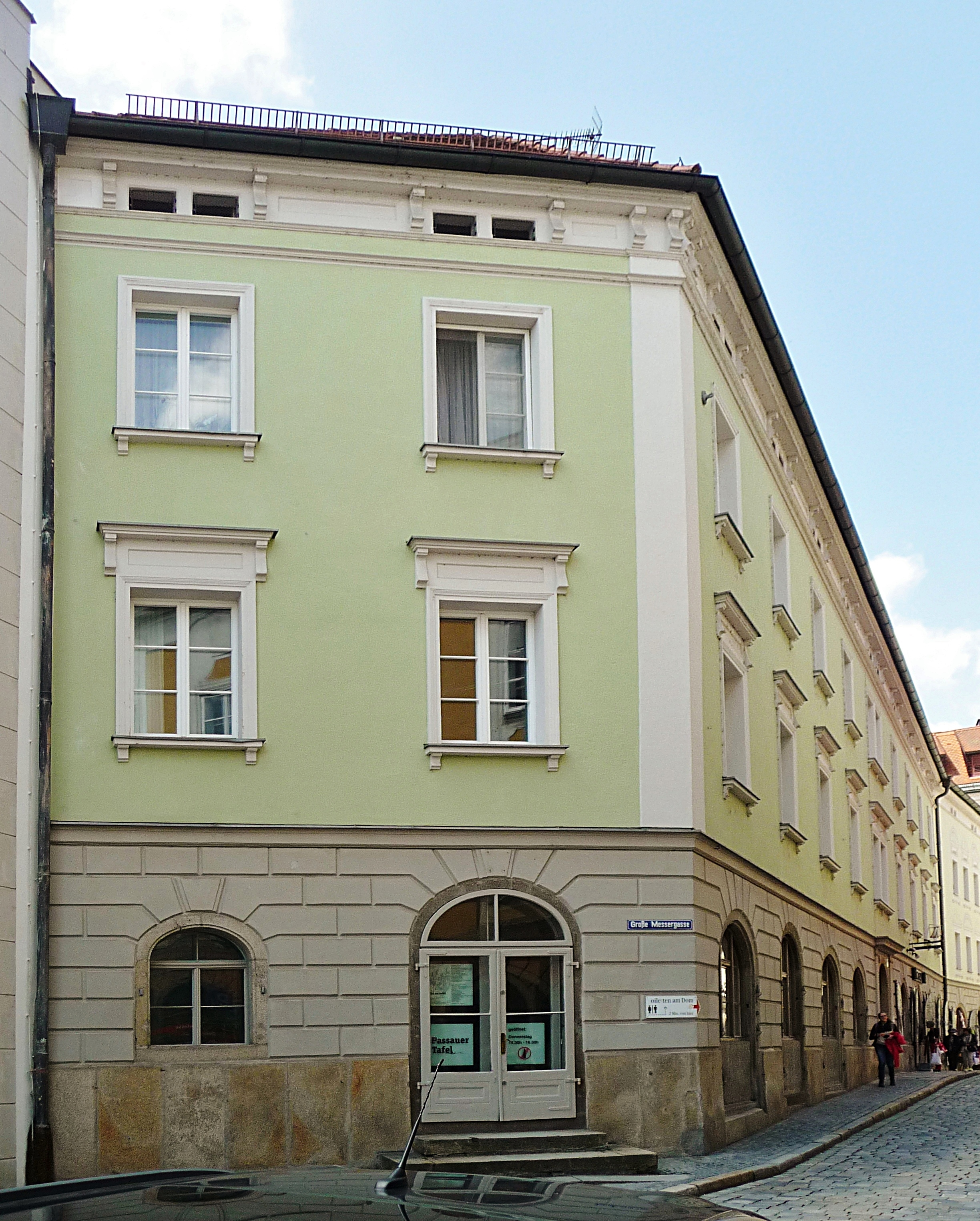 Das denkmalgeschützte Gebäude Große Messergasse 1 in Passau